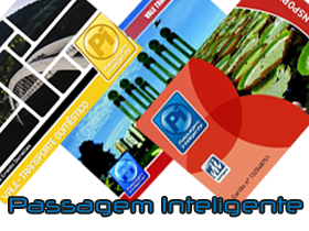 Cartões Passagem Inteligente